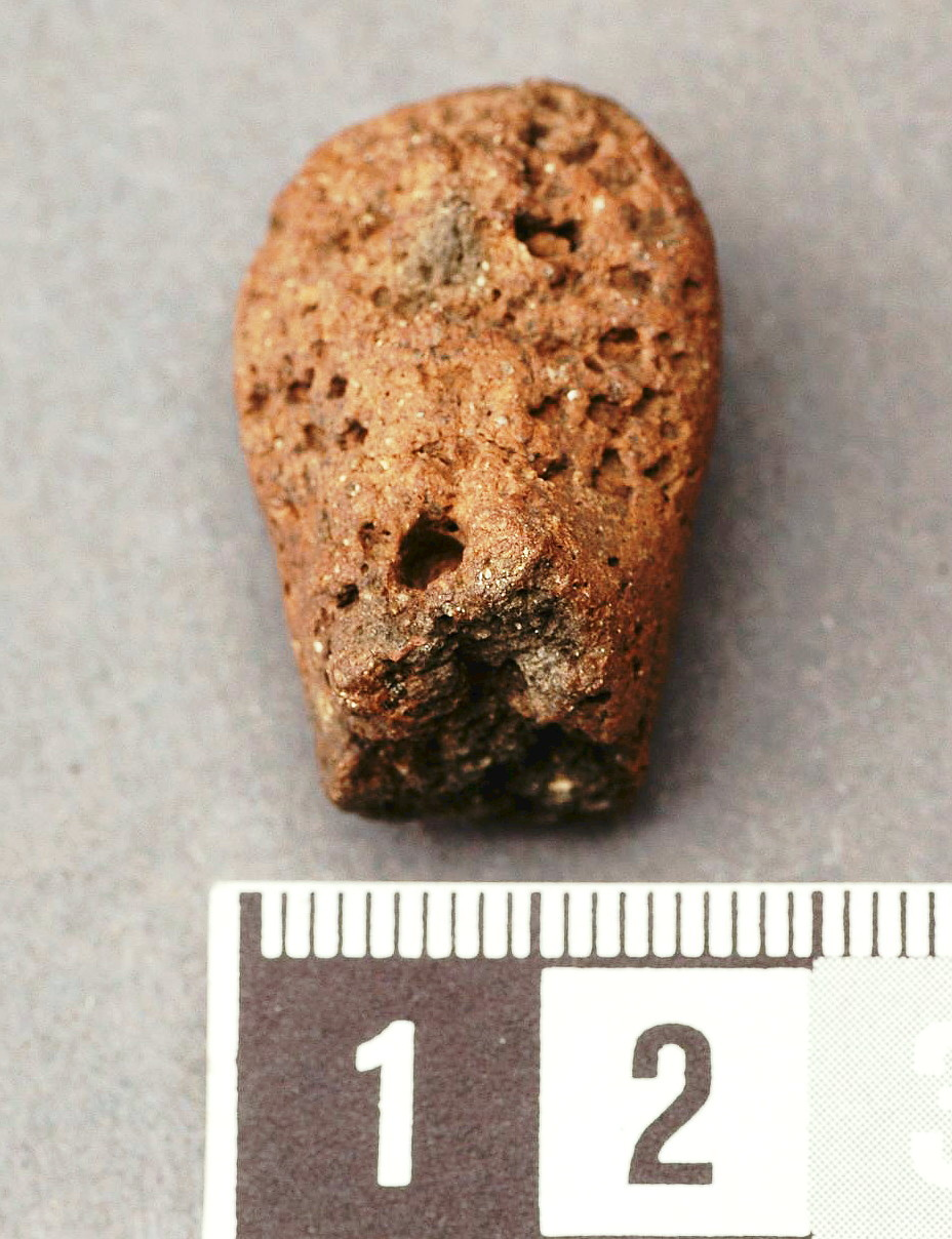 Huvud till en människofigur av keramik, kallat "Masmogubben". 3299 f.Kr. - 2300 f.Kr. i Masmo, Vårby gård, Huddinge kommun.